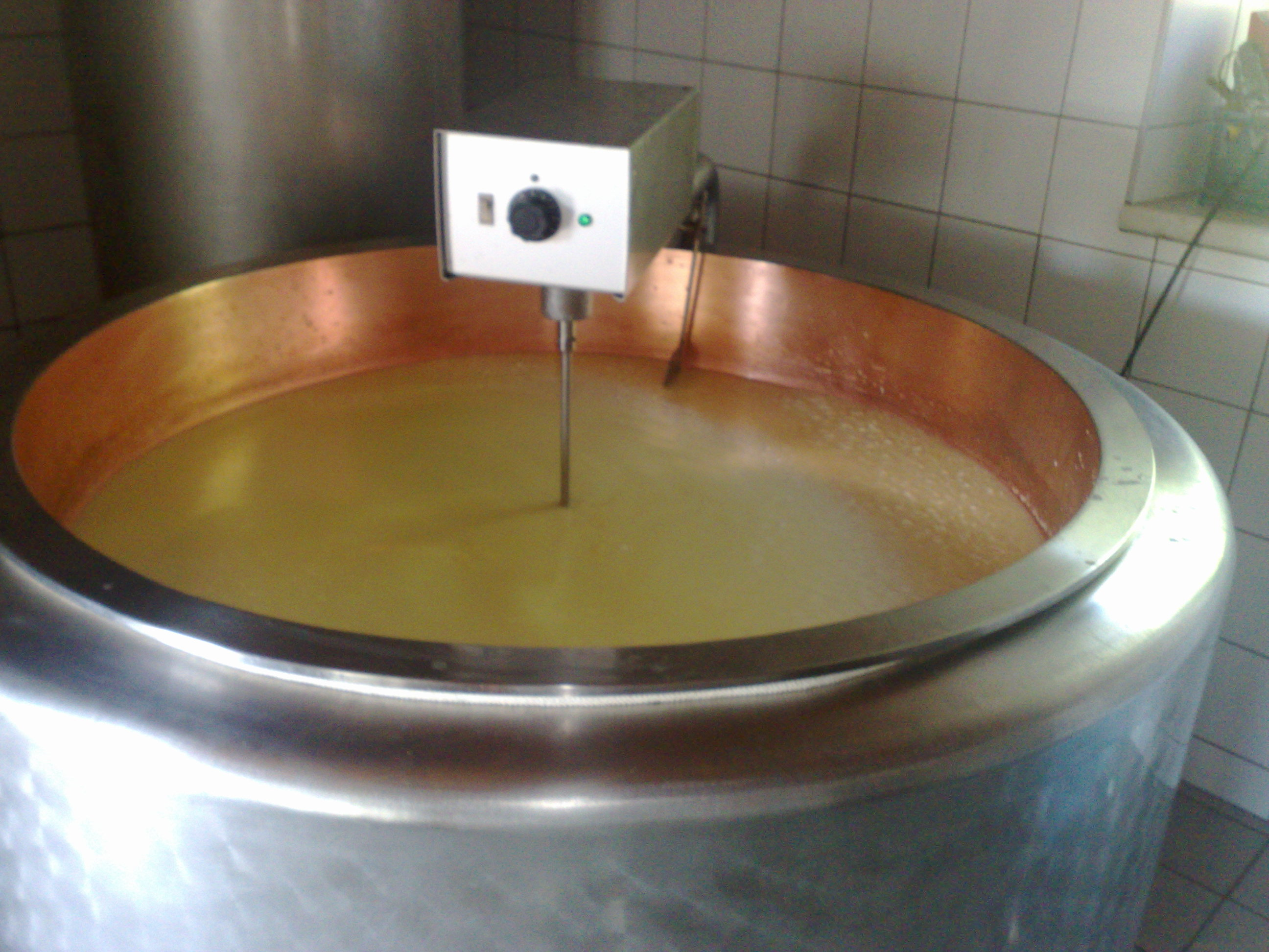 Gailtaler Almkäse g.U. von der Frondell Alm Kessel